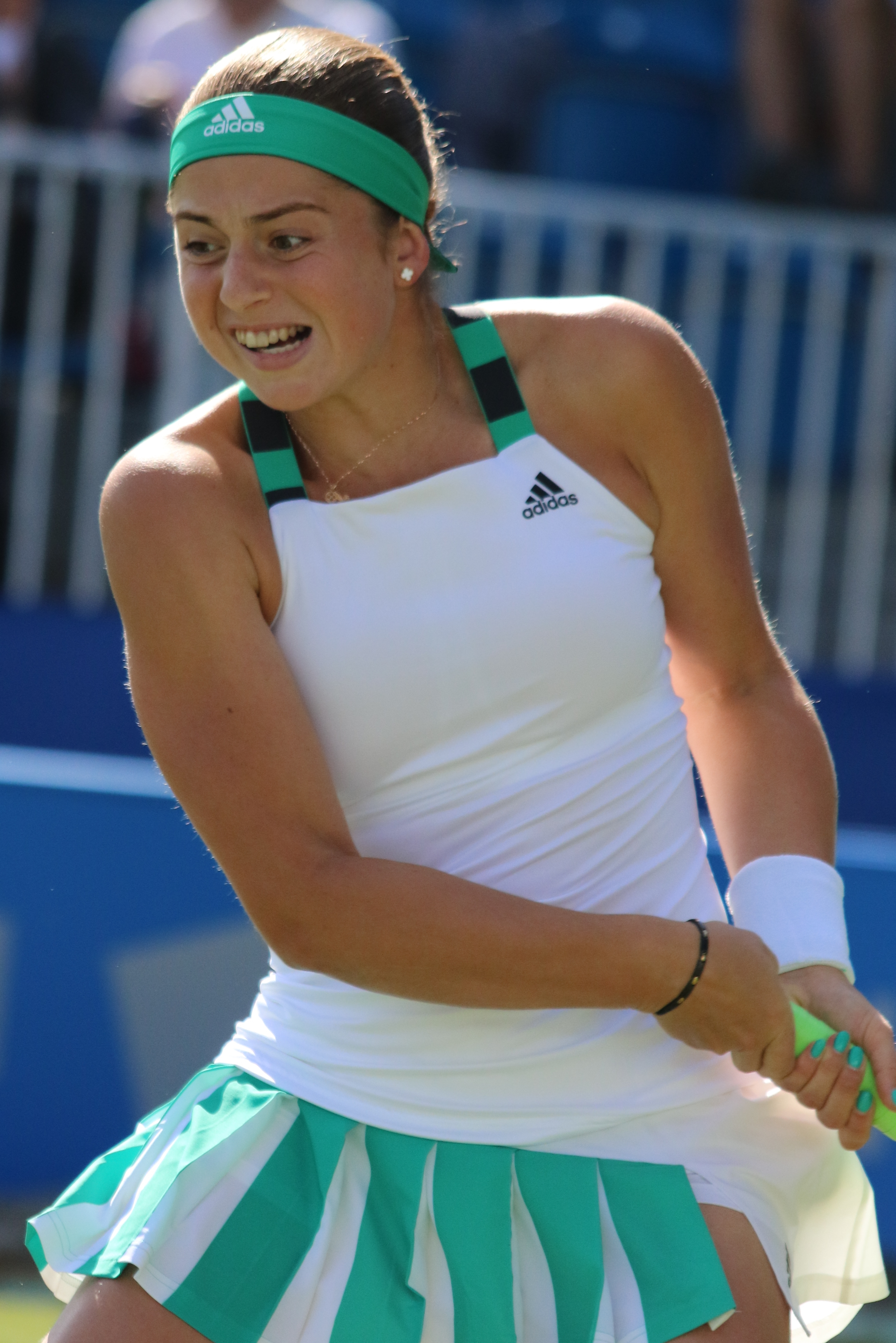 Ostapenko EBN17 (25)